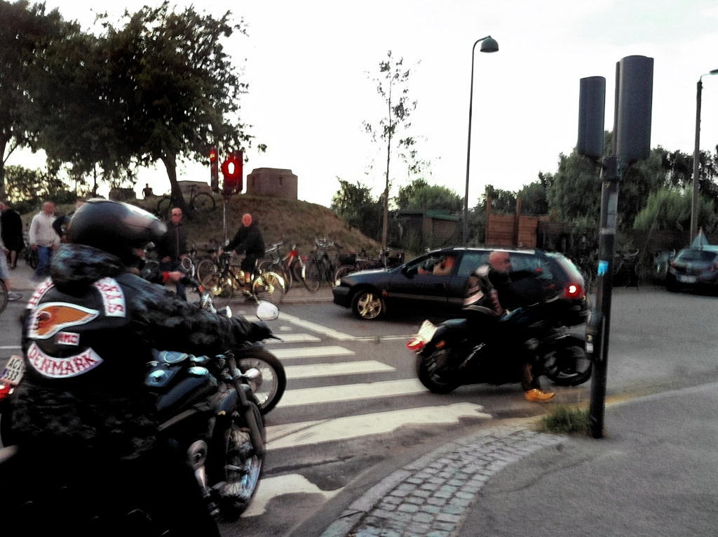 Mitglieder der Hells Angels Denmark in Sundbyøster in Kopenhagen-Christianshavn im Juni 2011.